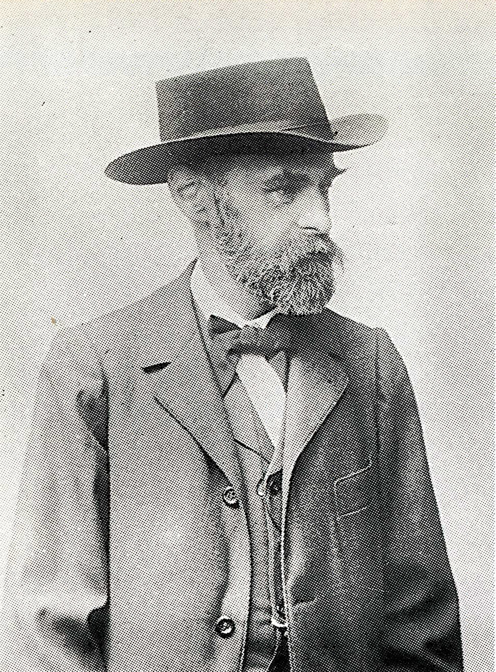 Kulttuurivaikuttaja Valfrid Vasenius (1848–1928).